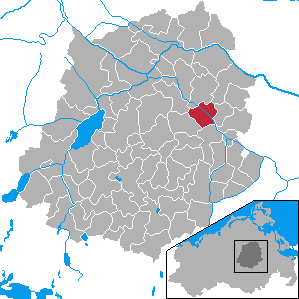 Alt Tellin, Landkreis Demmin, Mecklenburg-Vorpommern